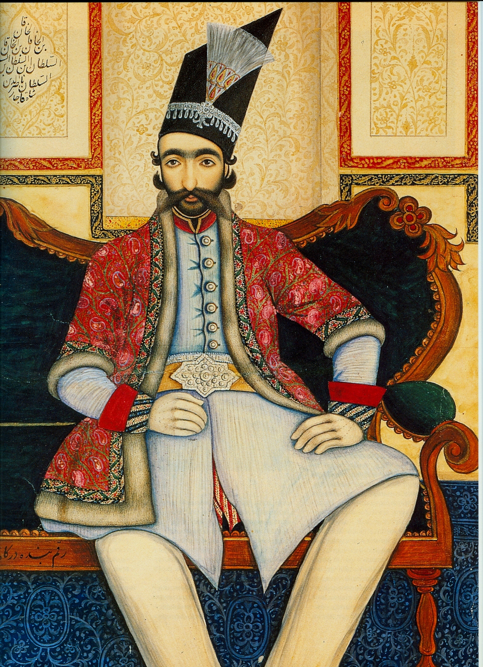 Muhammad_Isfahani_Nasir_ad-Din_1850s_Hermitage_S-Peterburg